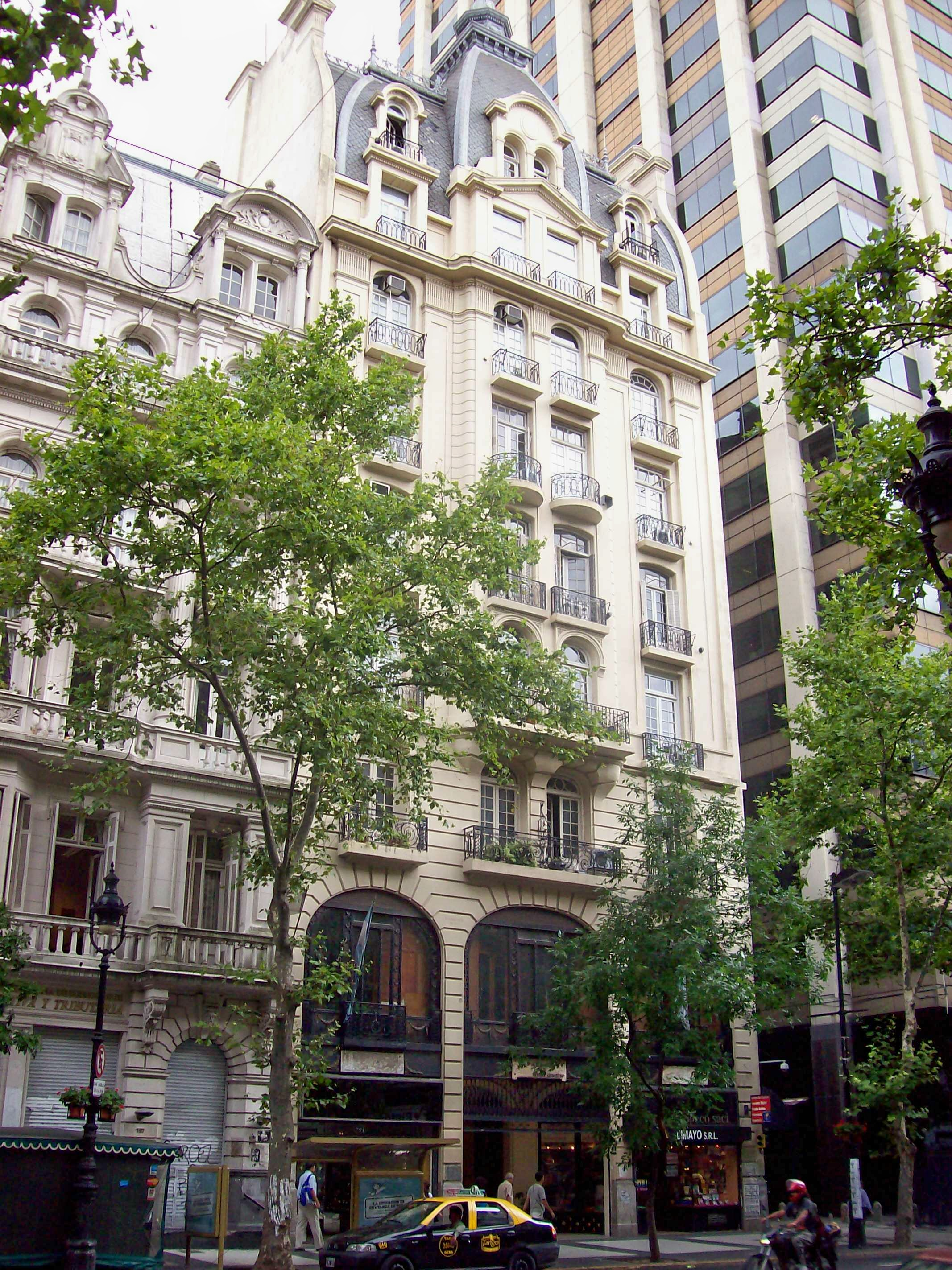 Pasaje Urquiza Anchorena, en Avenida de Mayo, Buenos Aires